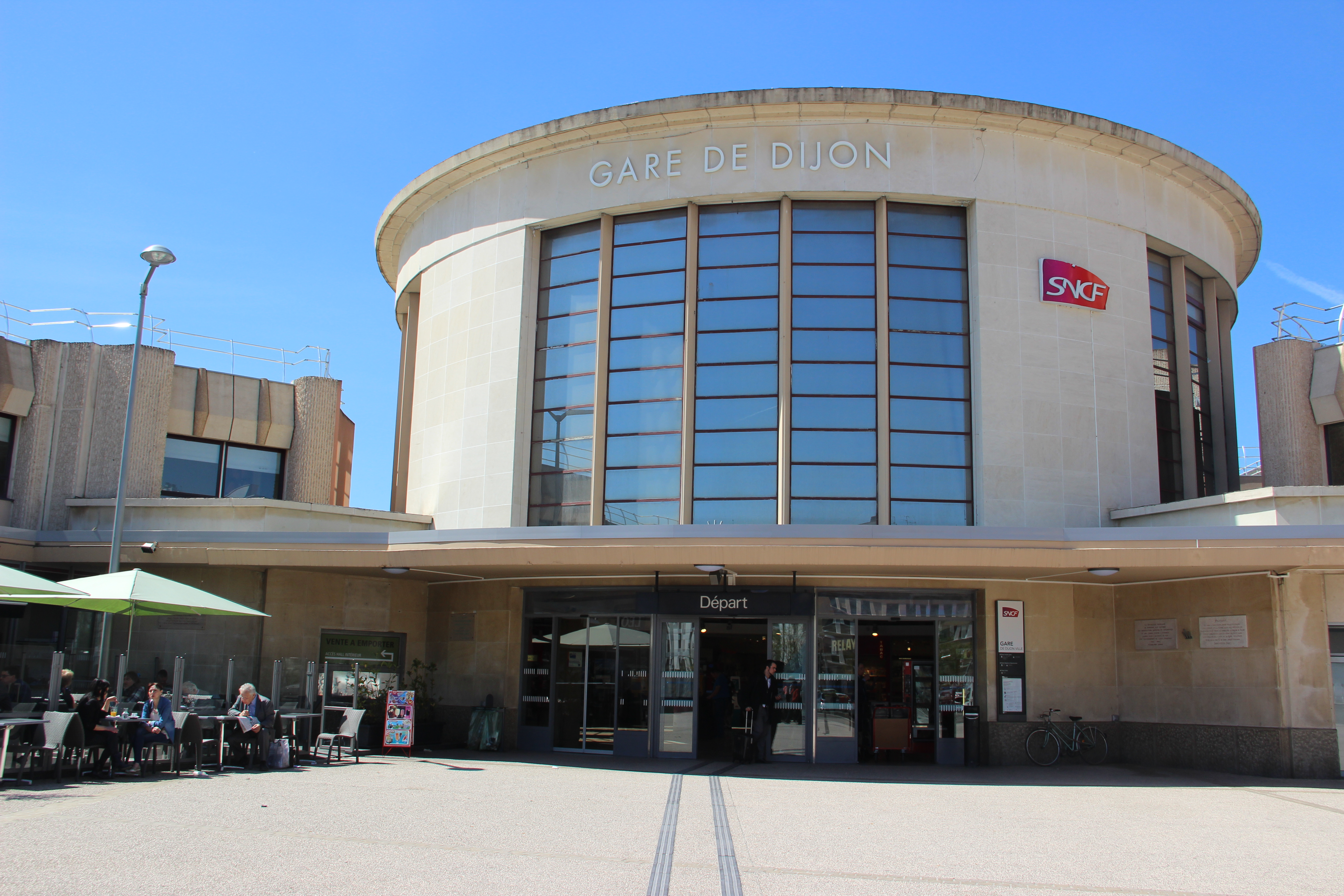 La façade de la gare